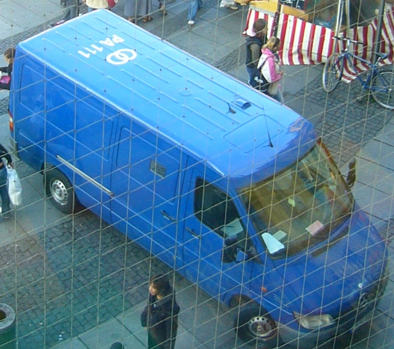 Luftkennung eines gewerblichen Geldtransportfahrzeuges, aufgenommen in München (Karlsplatz).